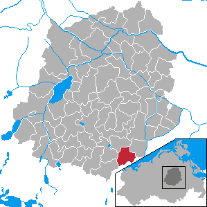 Breesen, Landkreis Demmin, Mecklenburg-Vorpommern